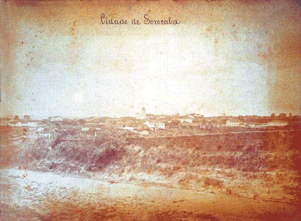 Cidade de Sorocaba, 1876. Fotografia albuminada, 22 x 30 cm. Do álbum Província de São Paulo (álbum de Francisco Ignácio Marcondes Homem de Mello, barão Homem de Mello). Acervo de obras raras da Biblioteca Mário de Andrade, São Paulo, Brasil.